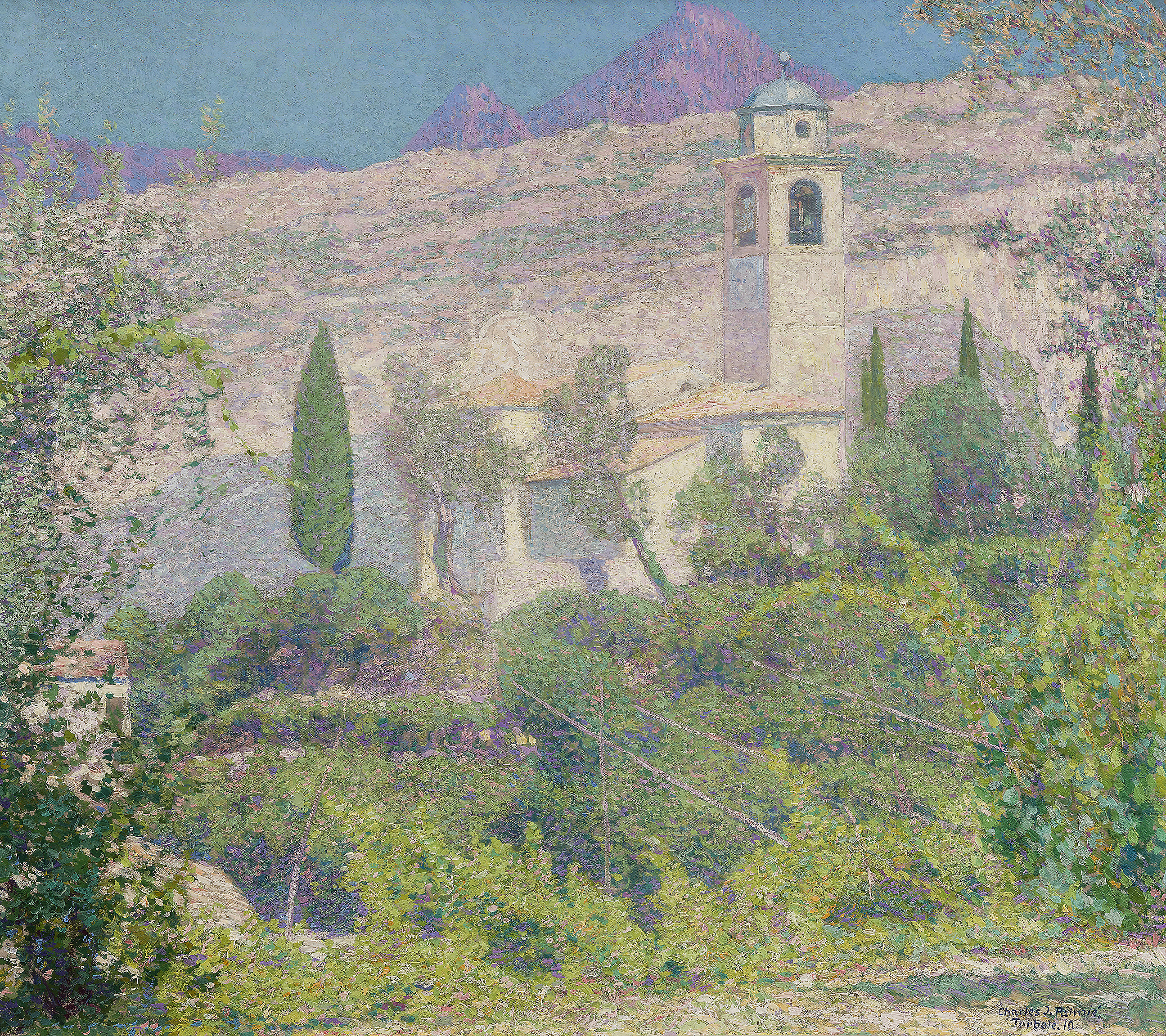 Johann Charles Palmié: Torbole am Gardasee. Öl auf Leinwand, 71 x 81 cm, rechts unten signiert, datiert und bezeichnet "Torbole"